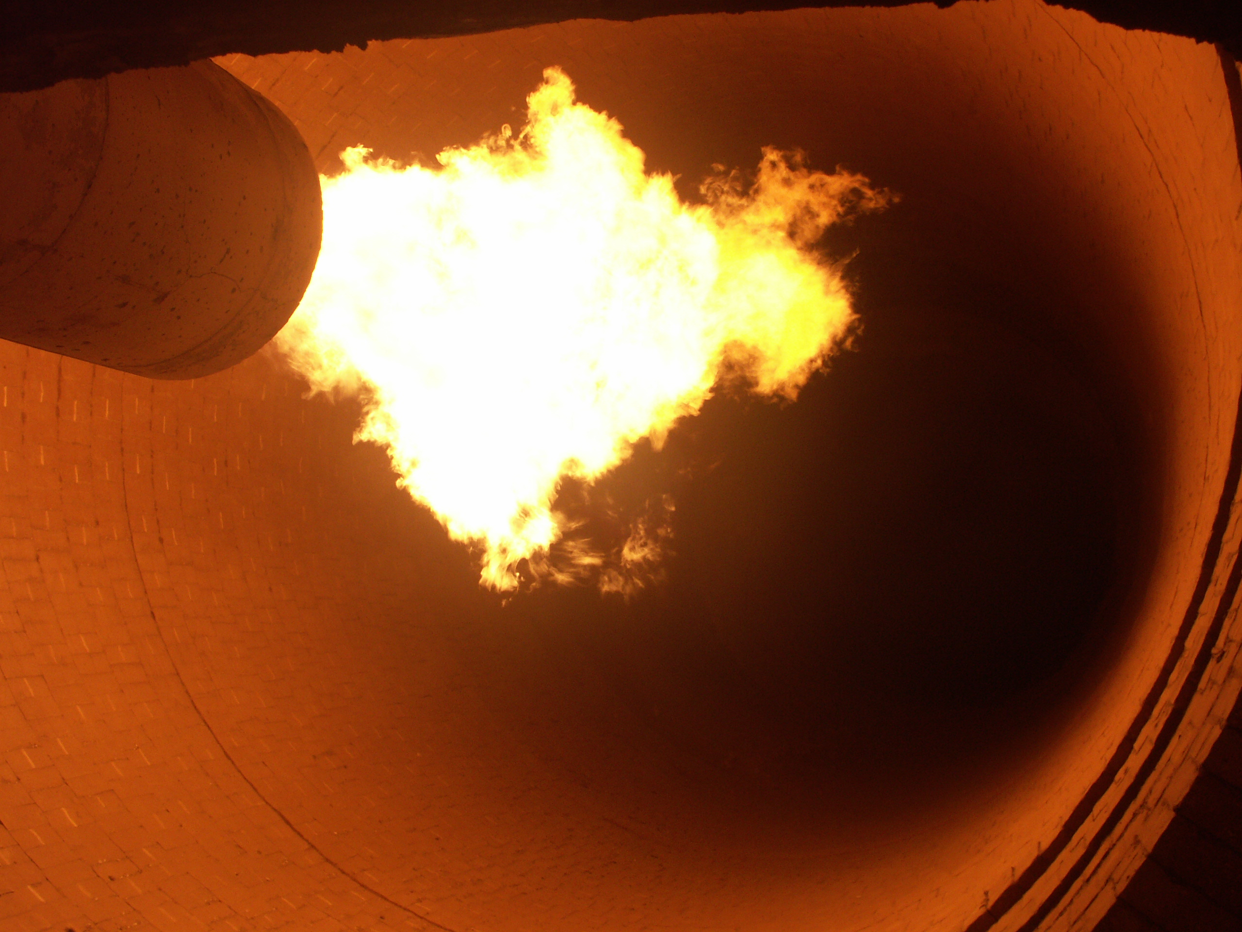 Peč